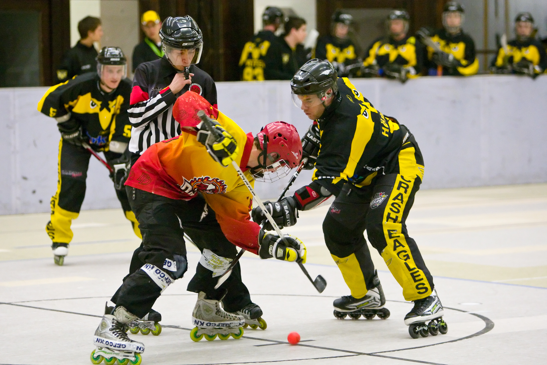 Bully beim Inline-Skaterhockey (Eagle-Cup 2009)